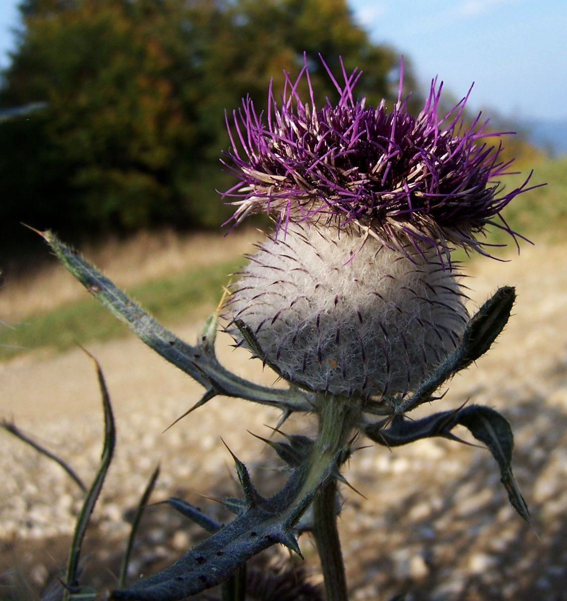 Cirsium eriophorum (pl. ostrożeń głowacz), habitat: Pieniny, Jarmuta